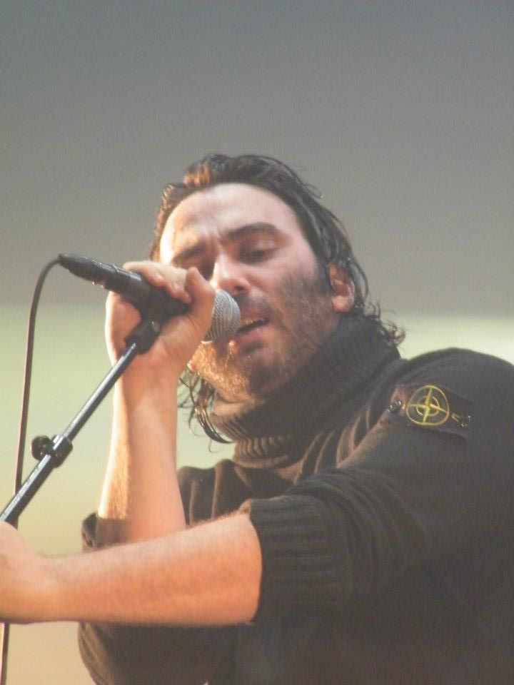 MIAMI TOUR A RENNES